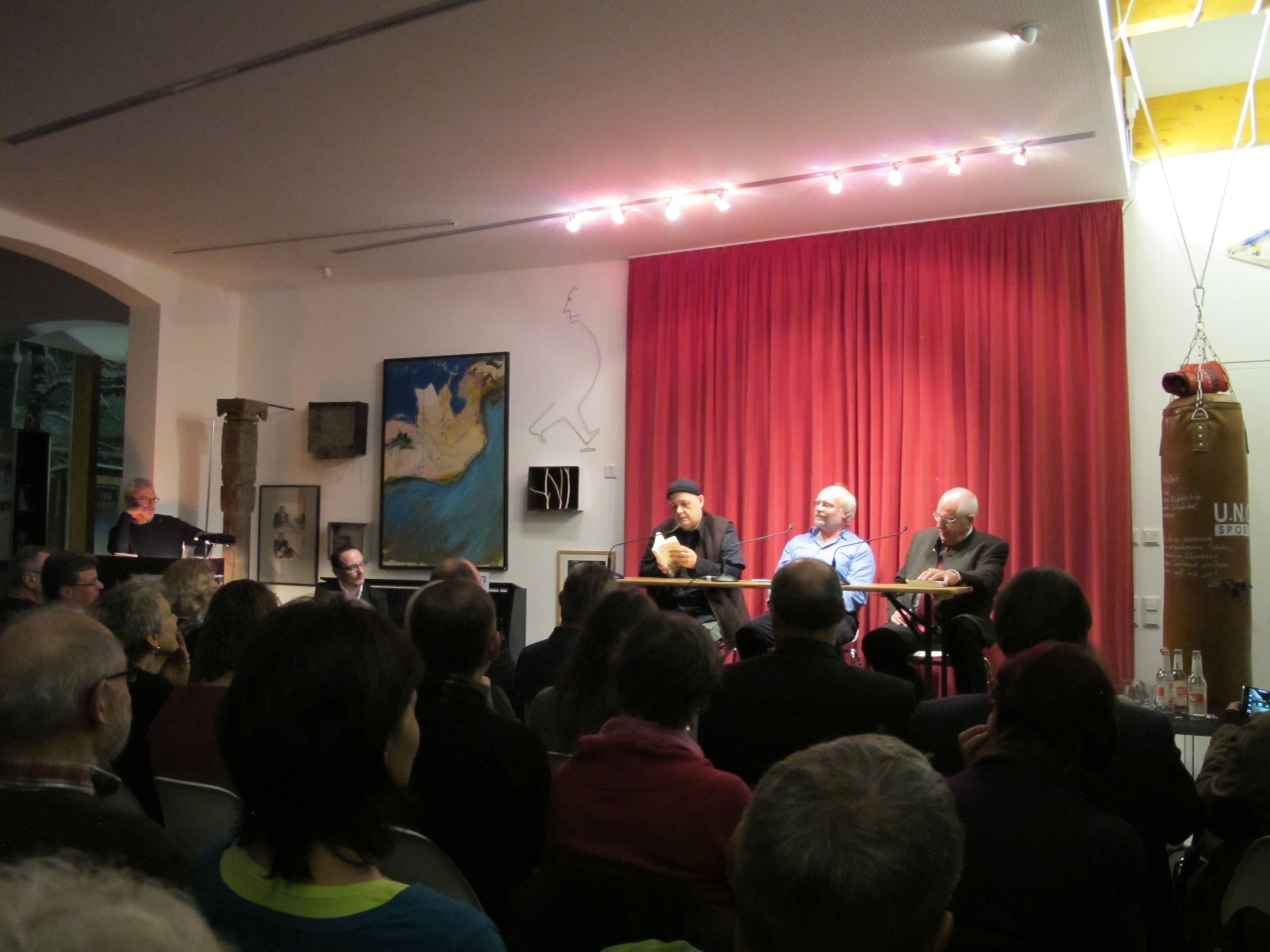 Lesung Lichtung Verlag Januar 2015 im Lyrik Kabinett, am Pult Hubert Ettl, am Lesepodium Carl-Ludwig Reichert, Albert Sigl und Walter Flemmer